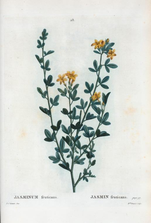 Jasminum fruticans = Jasmin fruticans.